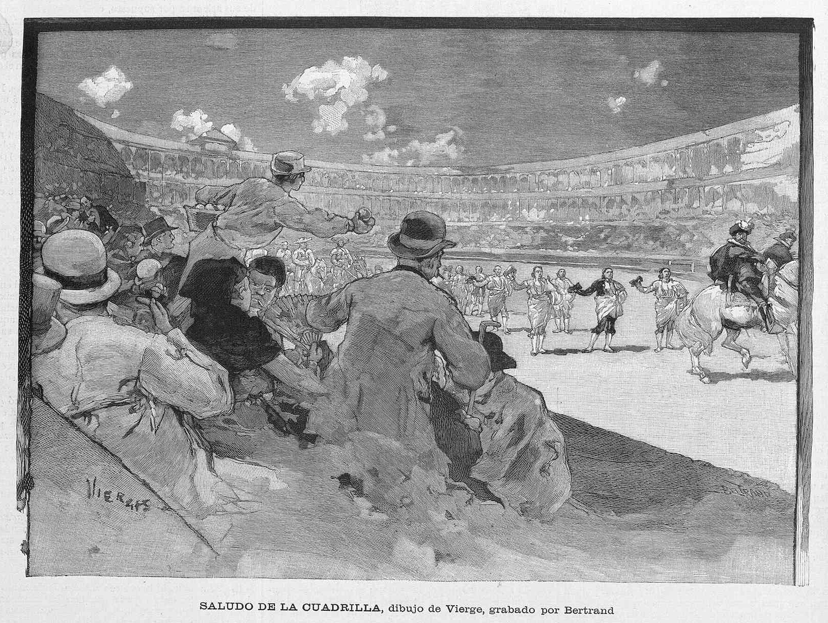 Saludo de la cuadrilla, de Daniel Urrabieta Vierge, en la revista La Ilustración Artística.